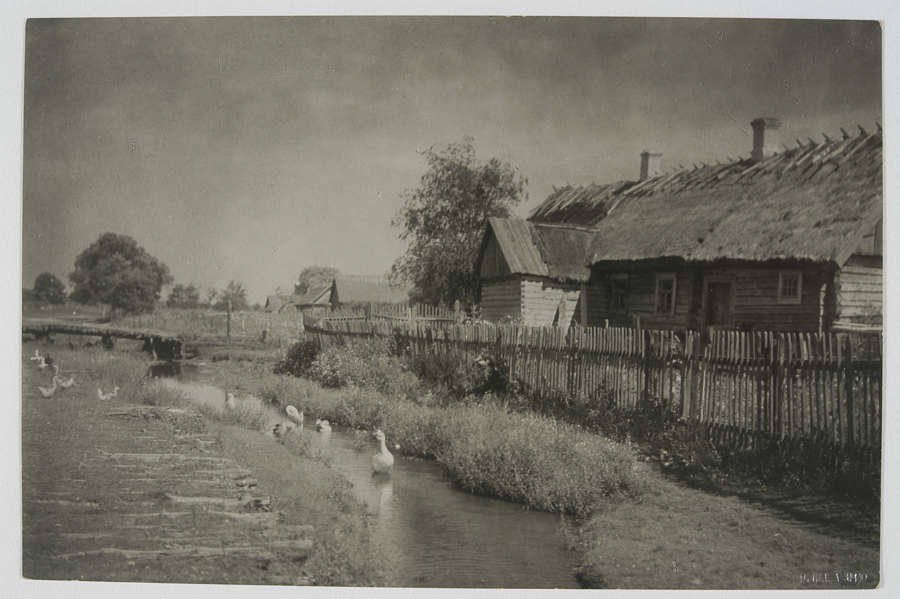 Беларуская (тарашкевіца): Парэчча (Parečča)